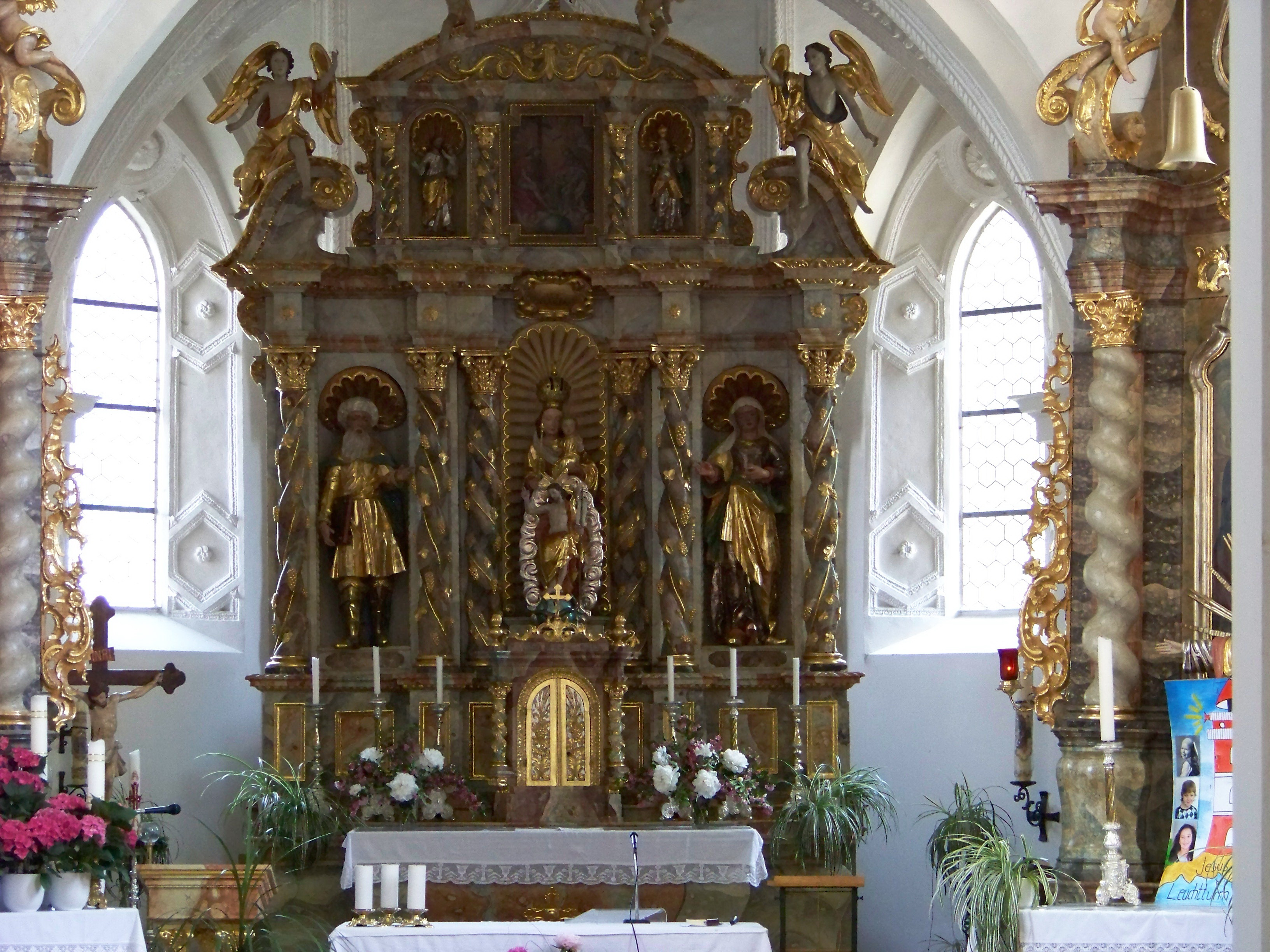 Rottenburg an der Laaber. Inkofen, Haus Nr. 117. Katholische Pfarrkirche Mariä Reinigung mit Kapelle. Saalkirche aus der zweiten Hälfte 15. Jahrhunderts. Barocker Ausbau in der Mitte des 17. Jahrhunderts. Die spitzbogigen Fenstergewände sind mit Rahmenstuck ausgeschmückt. Der stattliches Barockaltar entstand 1684 in Landshut. Der Altar besteht aus drei Figurennischen mit sechs gewundenen Säulen und einem breiten viersäuligen Aufsatz mit Segementgiebel. Die Dekoration besteht aus Knorpelwerk. Rundbogiger Tabernakel mit zweiflügeliger Tür und seitlichen gedrehten Säulchen.